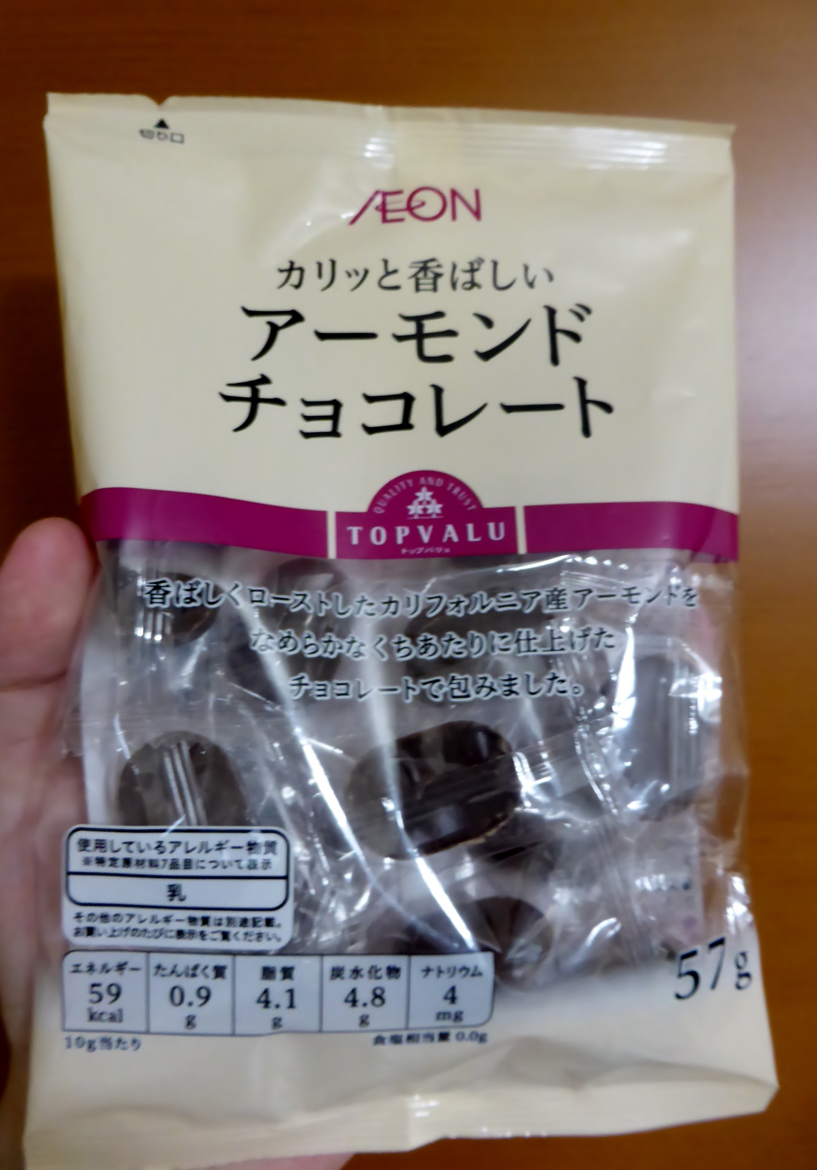 トップバリュのアーモンドチョコレートを撮影。新パッケージデザインが導入されている。